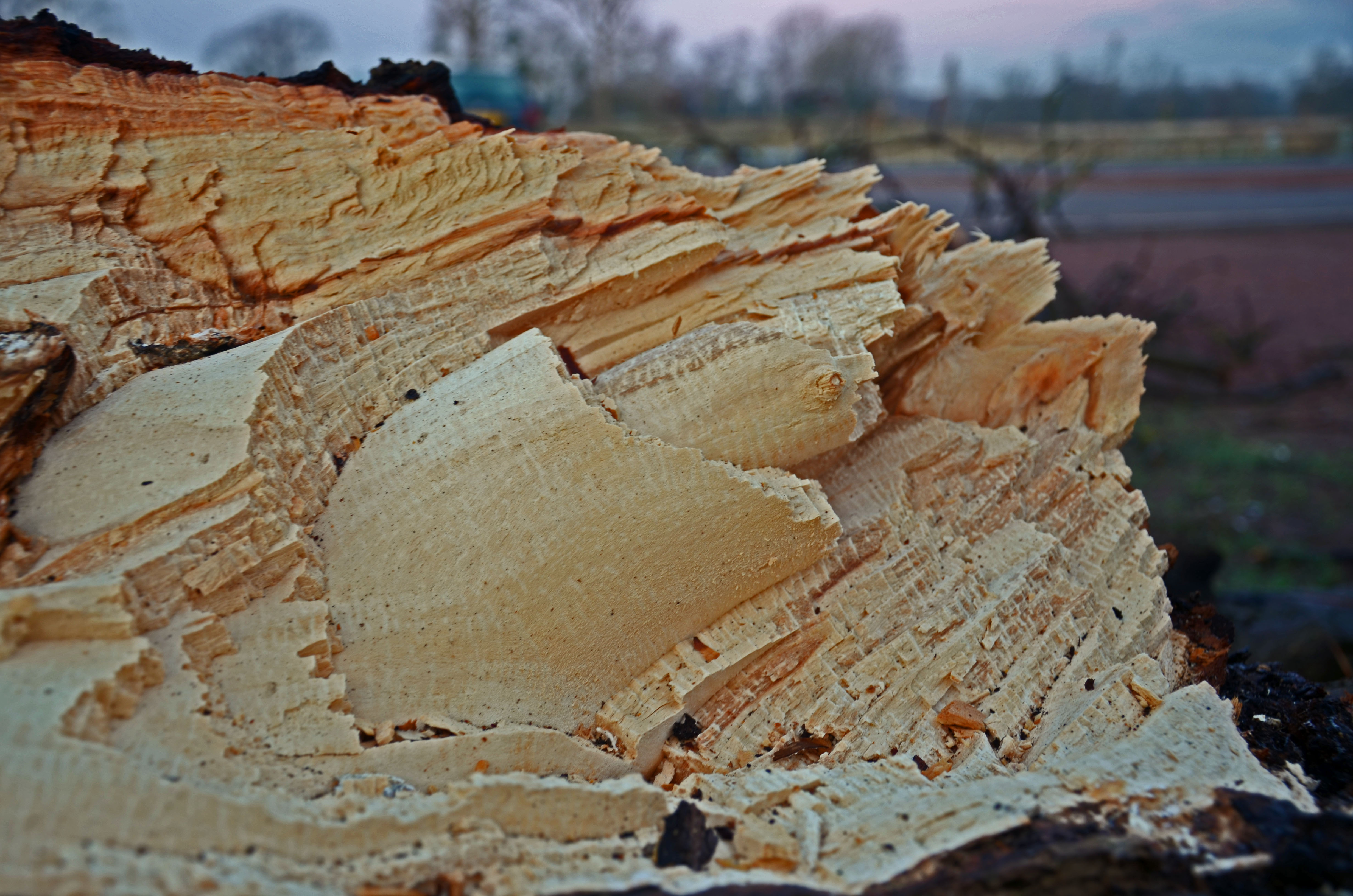 Marronier tué par une maladie bactérienne émergente (due à Pseudomoas syringae) à Lille (Nord de la France), en Bordure du Parking du champ de Mars, dans un alignement où de nombreux arbres ont la même maladie, à des stades plus ou moins avancés. Détail d'une cassure occasionnée par la chute du tronc lorsqu'il a été tronçonné. Unknown